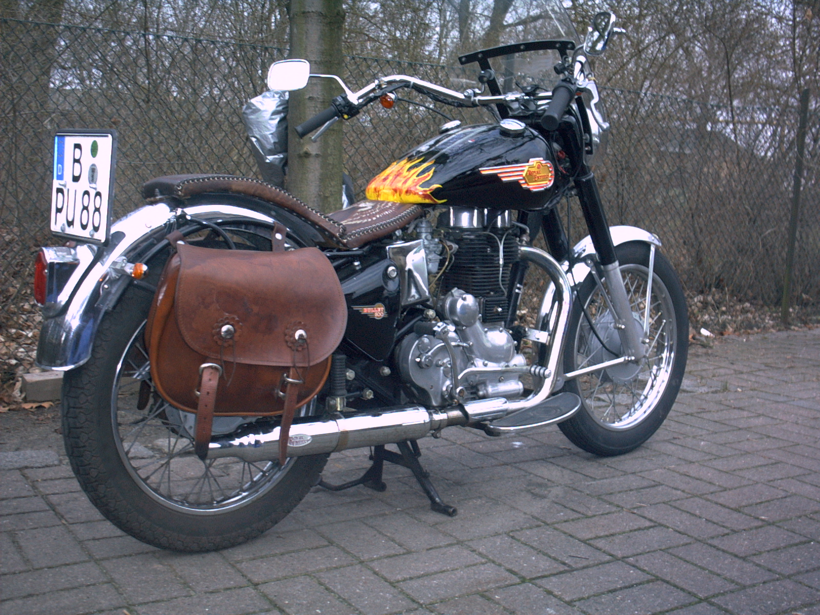 Royal Enfield (Baujahr 2001): Wie man sehen kann ist die Maschine nicht mehr im Originalzustand. Einige Dinge wurden von mir verändert; so, z.B. der Lenker aus Edelstahl/Fa. V-Team; der Tank u. die Sitzbank sind aus dem Zubehörbereich Richtung Harley; um die Trittbretter anzubauen,musste der Bremms, u. Schalthebel verlängert werden;darum hat sich die Fa. Climax gekümmert. Alles in allem ein ziemlich grosser Aufwand,um die R.E.nach meinen Wünschen herzurichten. Die Höchstgeschwindigkeit beträgt ca' 125 Km. Da sie ungefähr seit 50 Jahren in Indien hergestellt wird, kann man sich ausrechnen, das die Einbauteile entsprender Qualität sind. Ich stelle sie hier rein, damit jeder sehen kann,wie vielfältig die Möglichkeiten sind so ein Motorrad umzugestalten; allerdings habe ich auch inzwischen etliche andere Umbauten,auch hier in Berlin, gesehen.